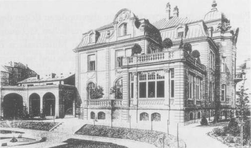 Villa Simolin in Stuttgart, Rotebühlstraße 70; Wohnsitz von Henriette Freifrau von Simolin-Knosp (Tochter des Unternehmers Rudolf Knosp); im Zweiten Weltkrieg zerstört